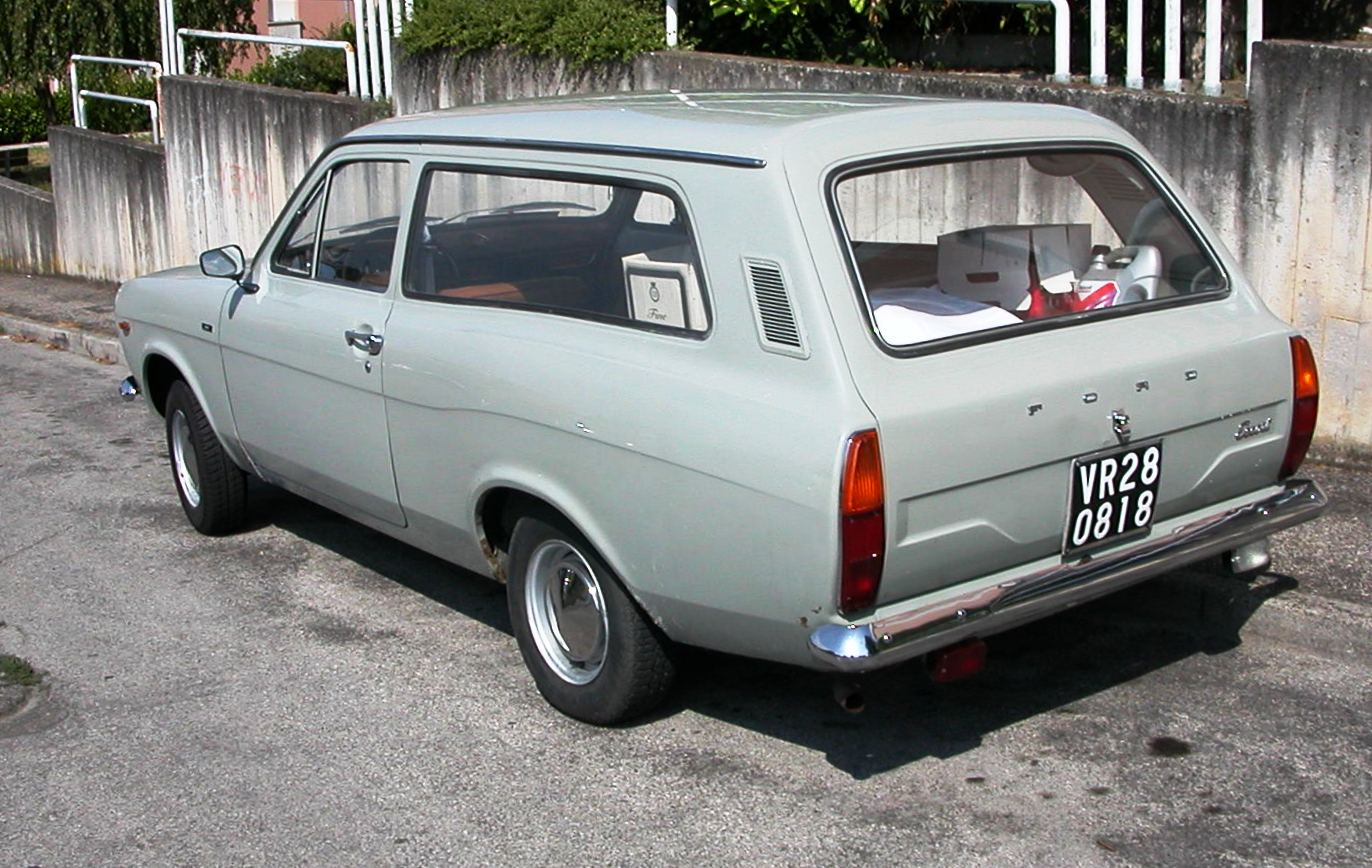 Ford Escort MkI Kombi immatriculation Vérone